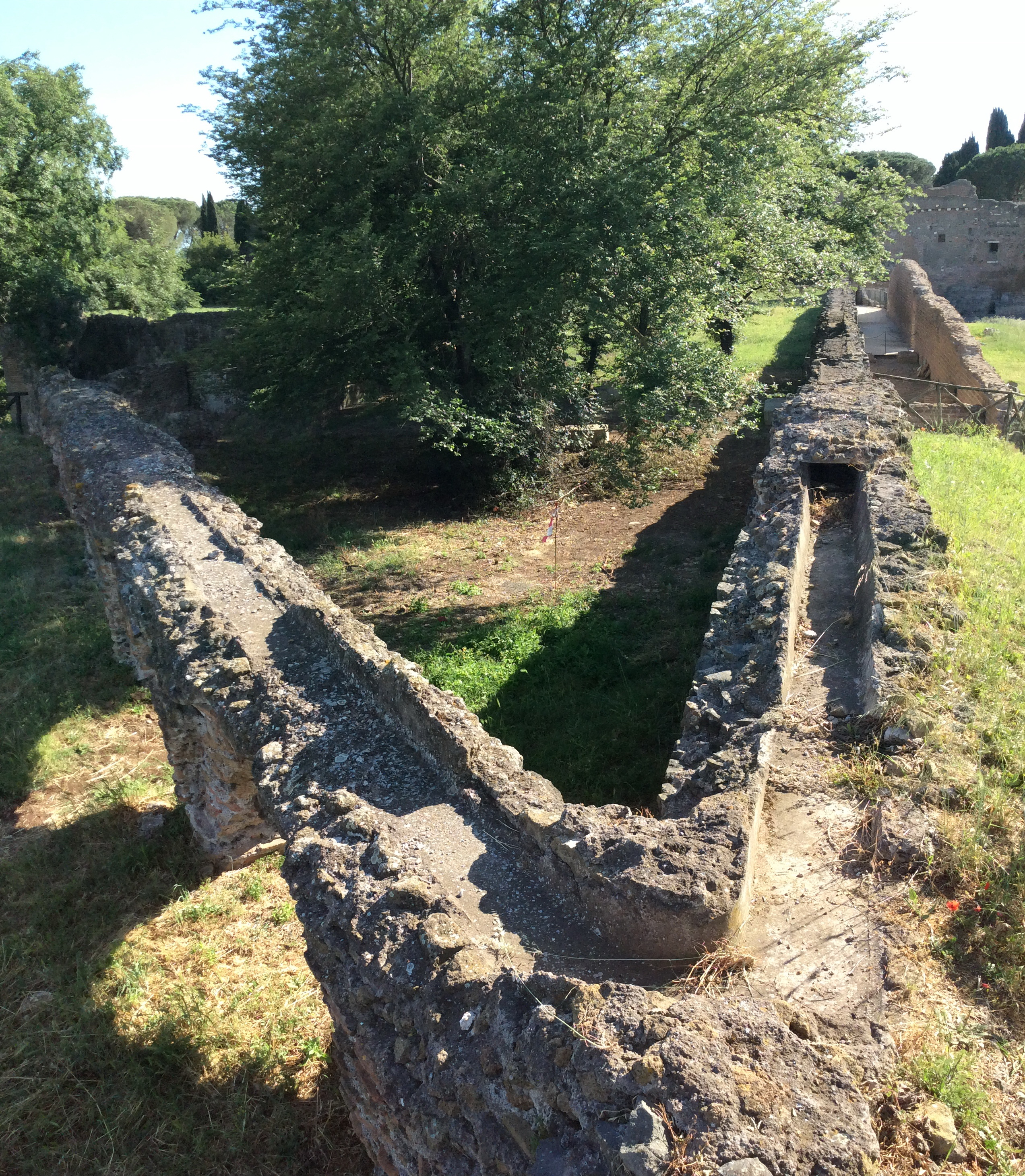 Bifurcation d'un aqueduc amenant l'eau de deux sources différentes